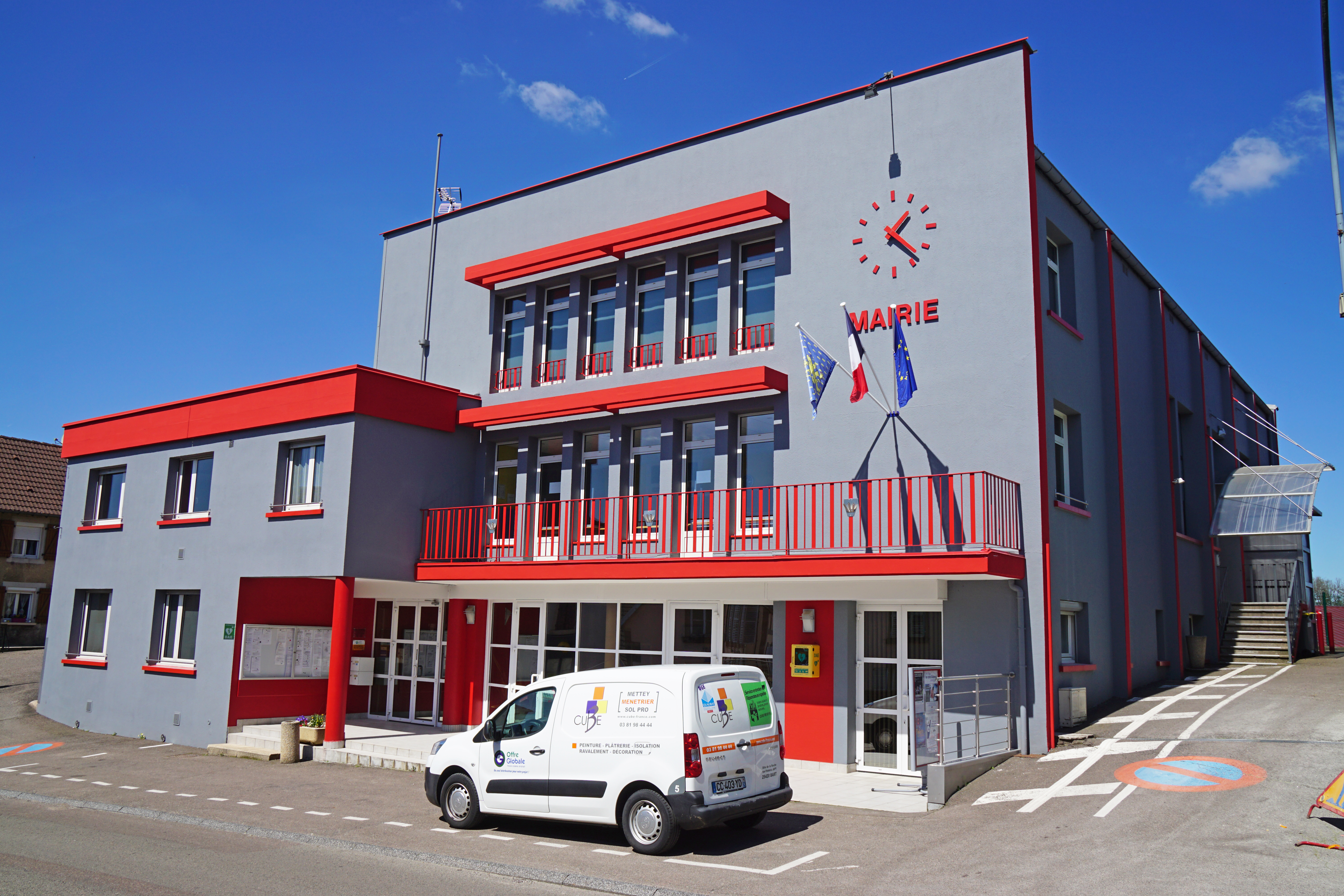 La mairie de Mélisey (Haute-Saône).